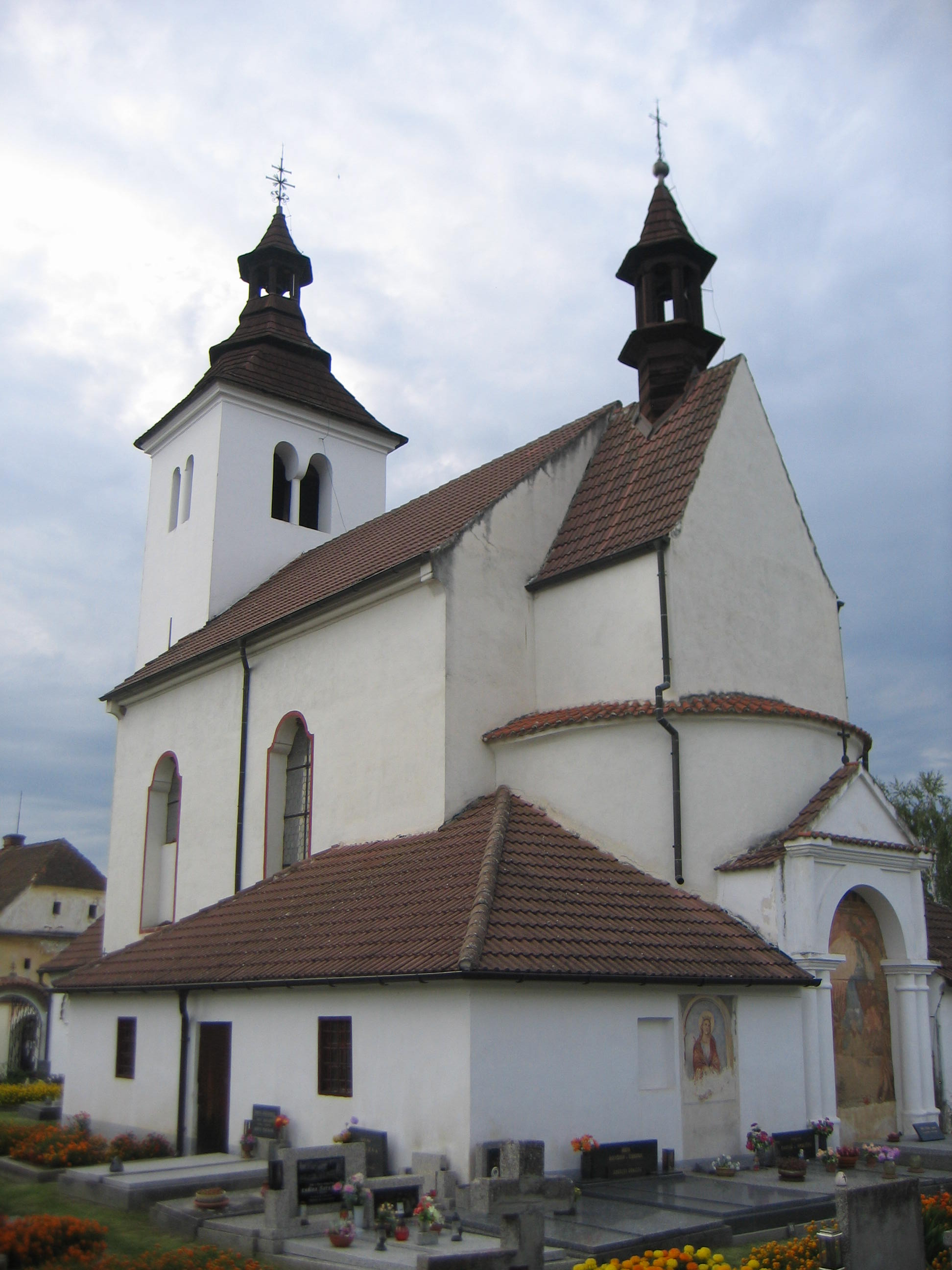 Kostel sv. Petra a Pavla (Albrechtice nad Vltavou), Albrechtice nad Vltavou